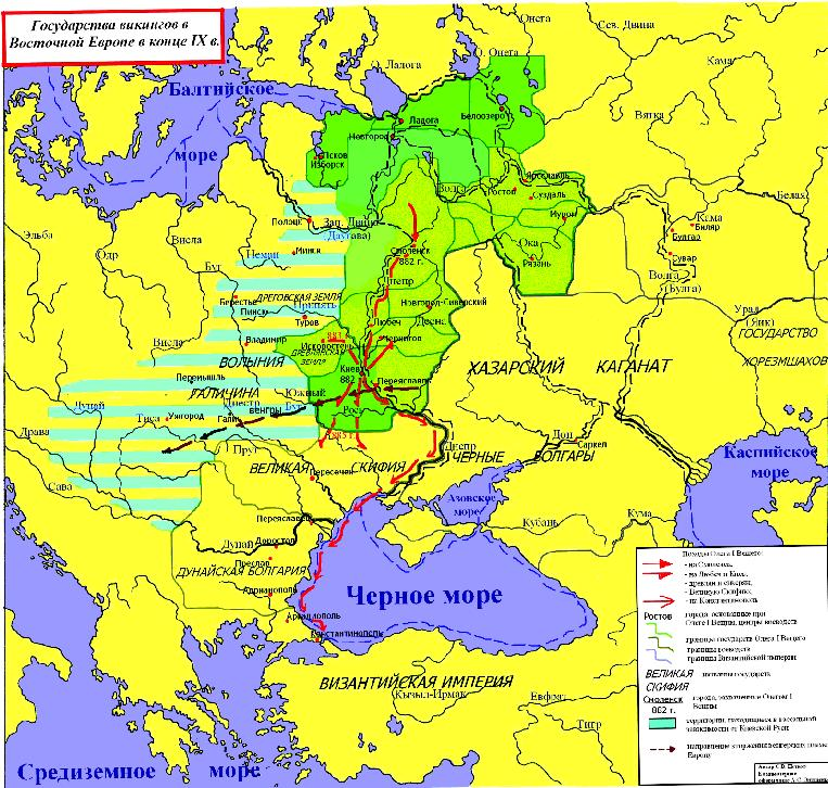 Русь во время правления Олега І